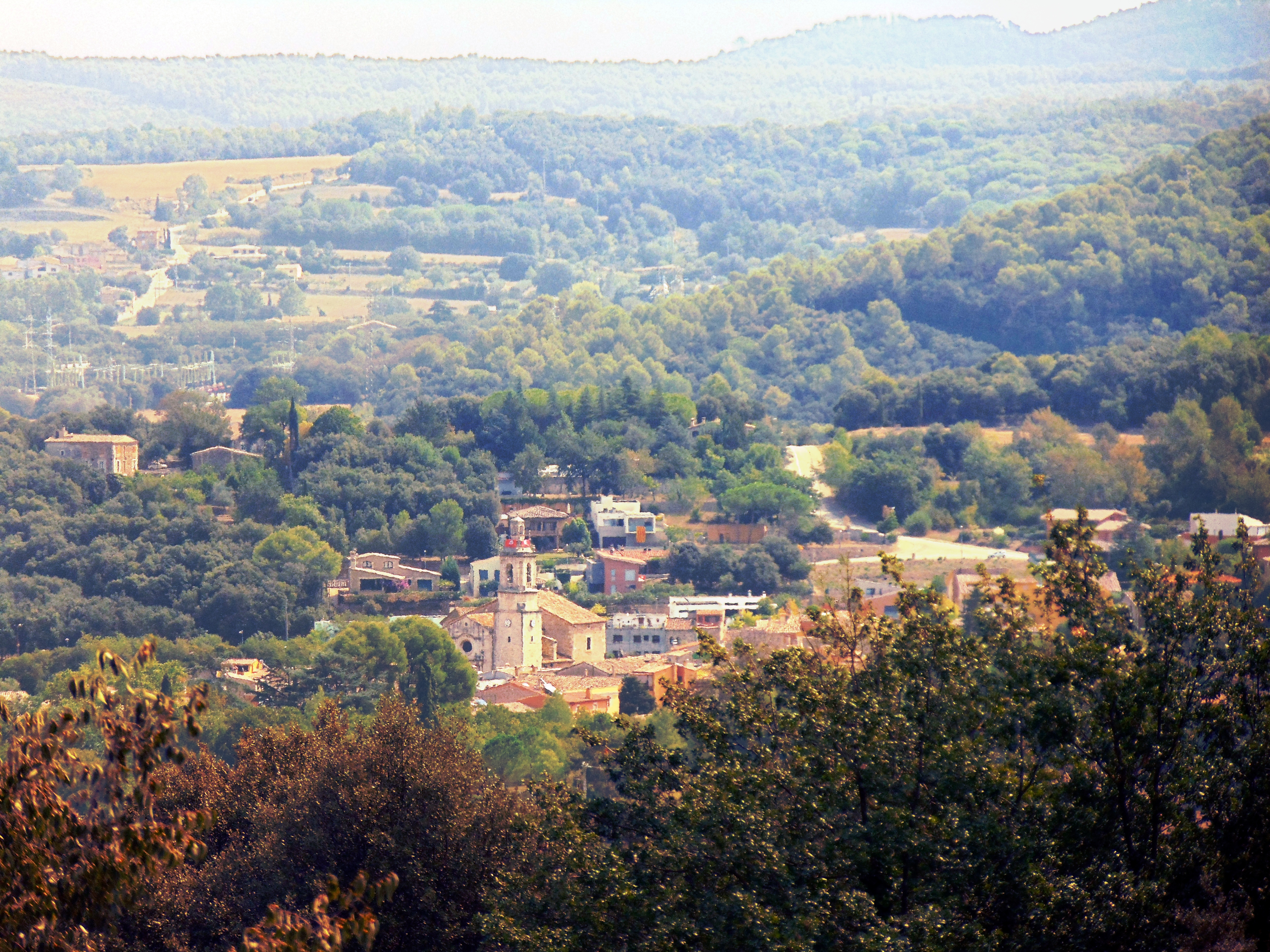 Església parroquial de Sant Feliu (Celrà)